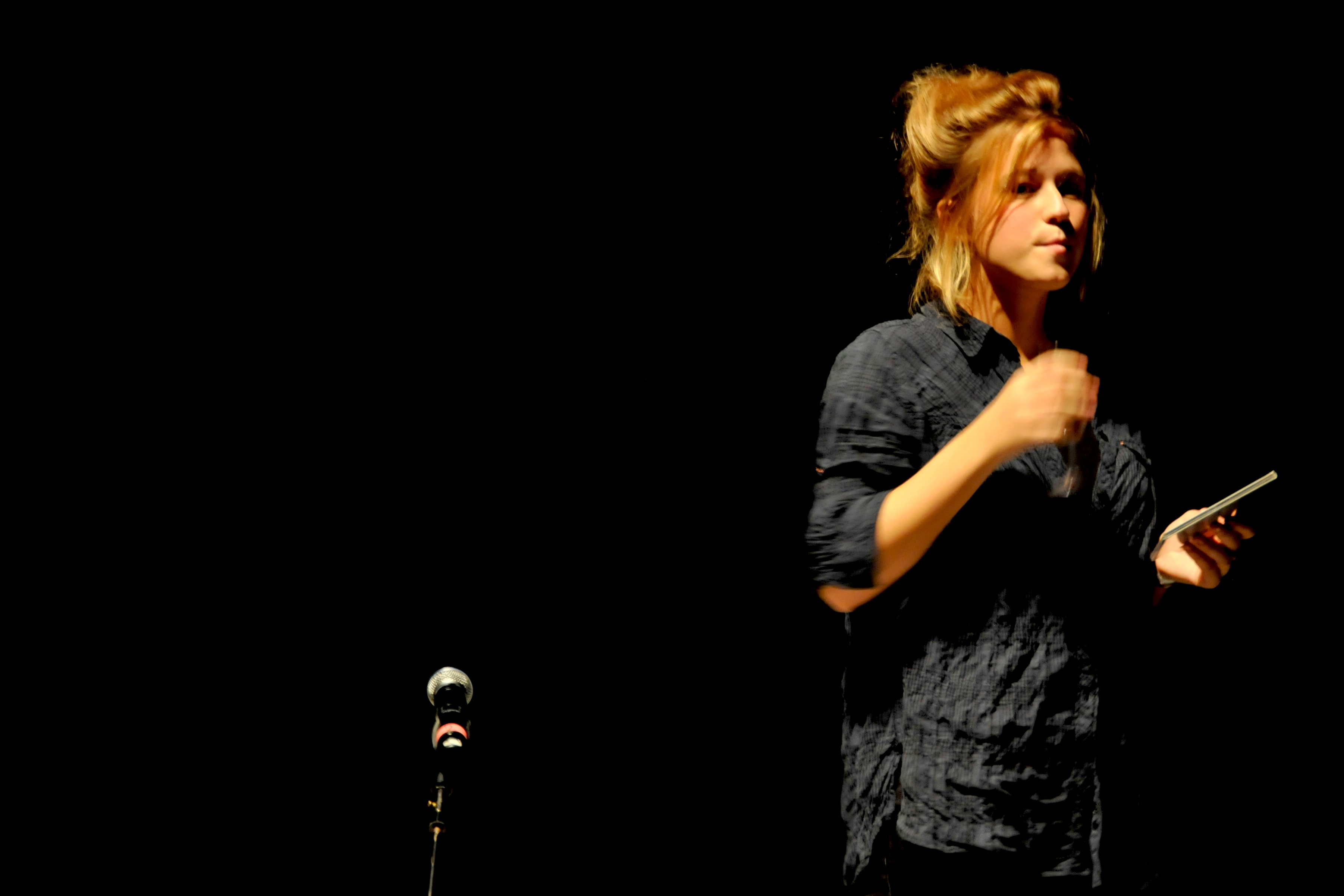 muzikantendag, AB Brussel, 14 nov 2009.